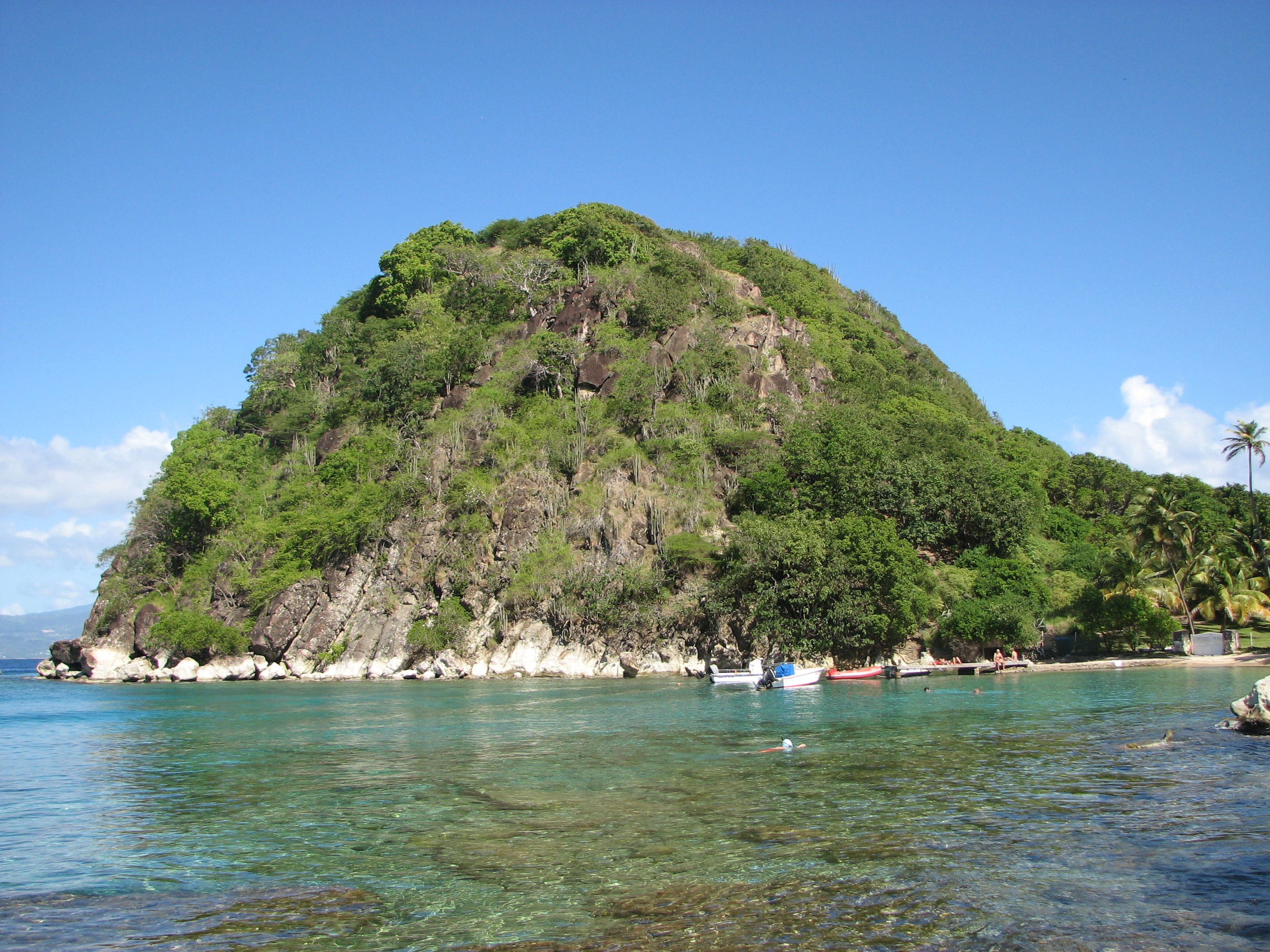 Pain de Sucre, sur l'île de Terre-de-Haut (Les Saintes, Guadeloupe)